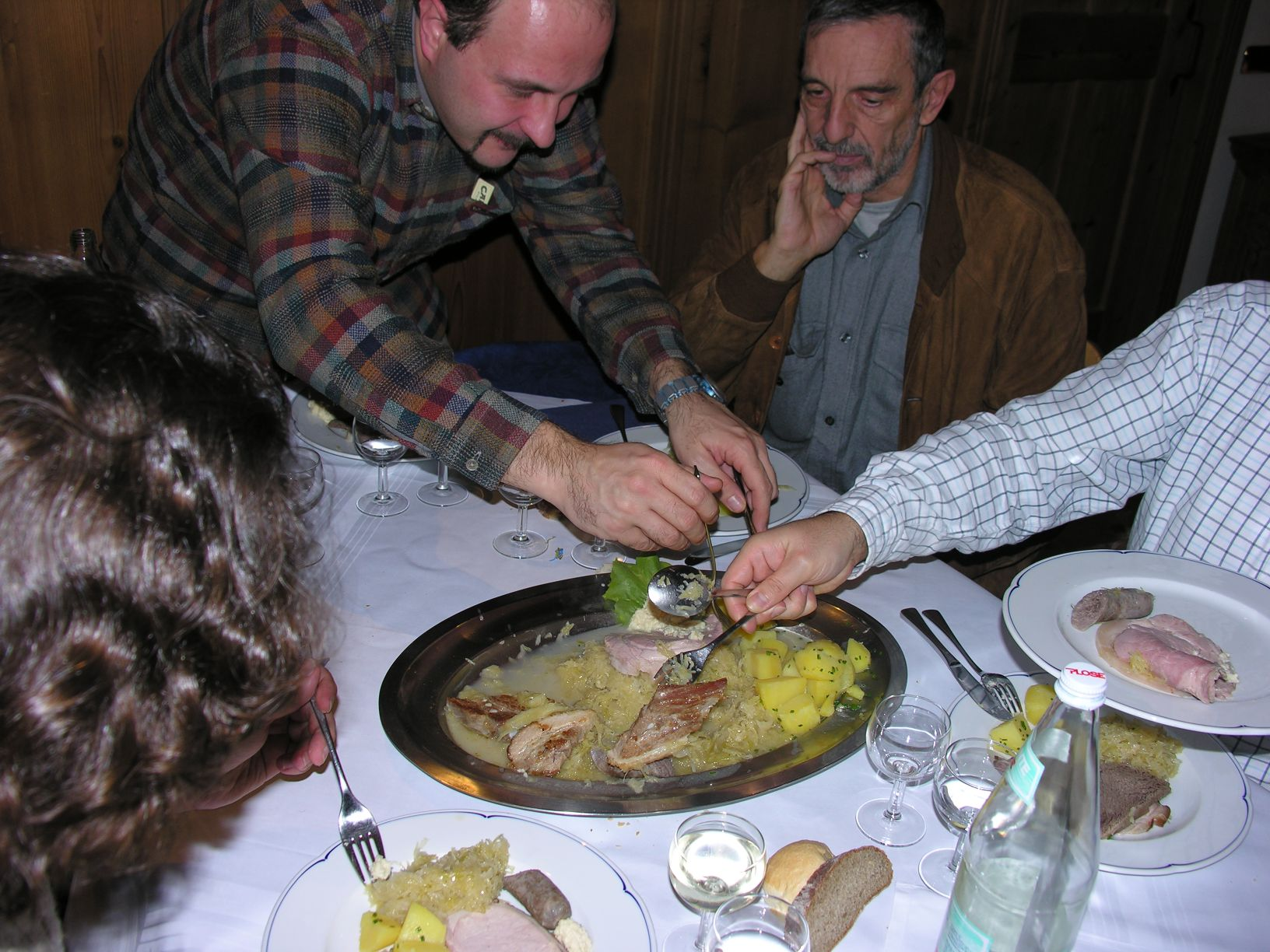 Piatto tipico tirolese